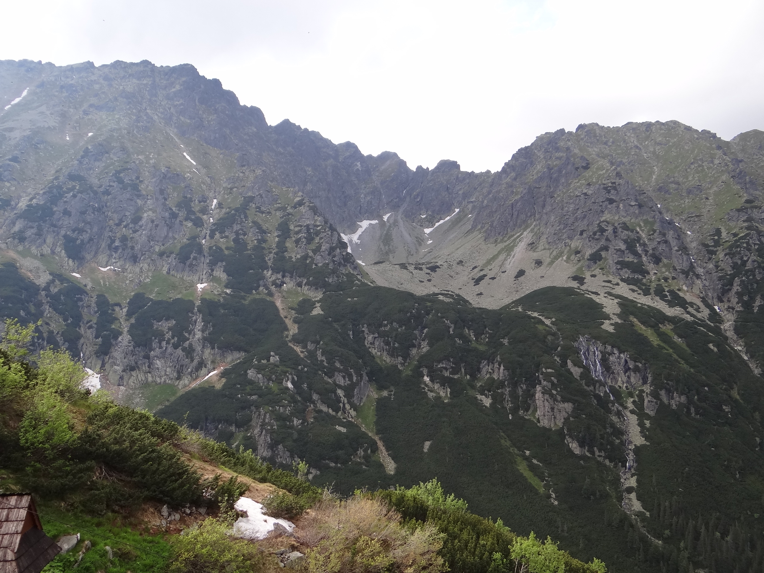 Widok spod Niznej Kopy na Dolinkę Buczynową